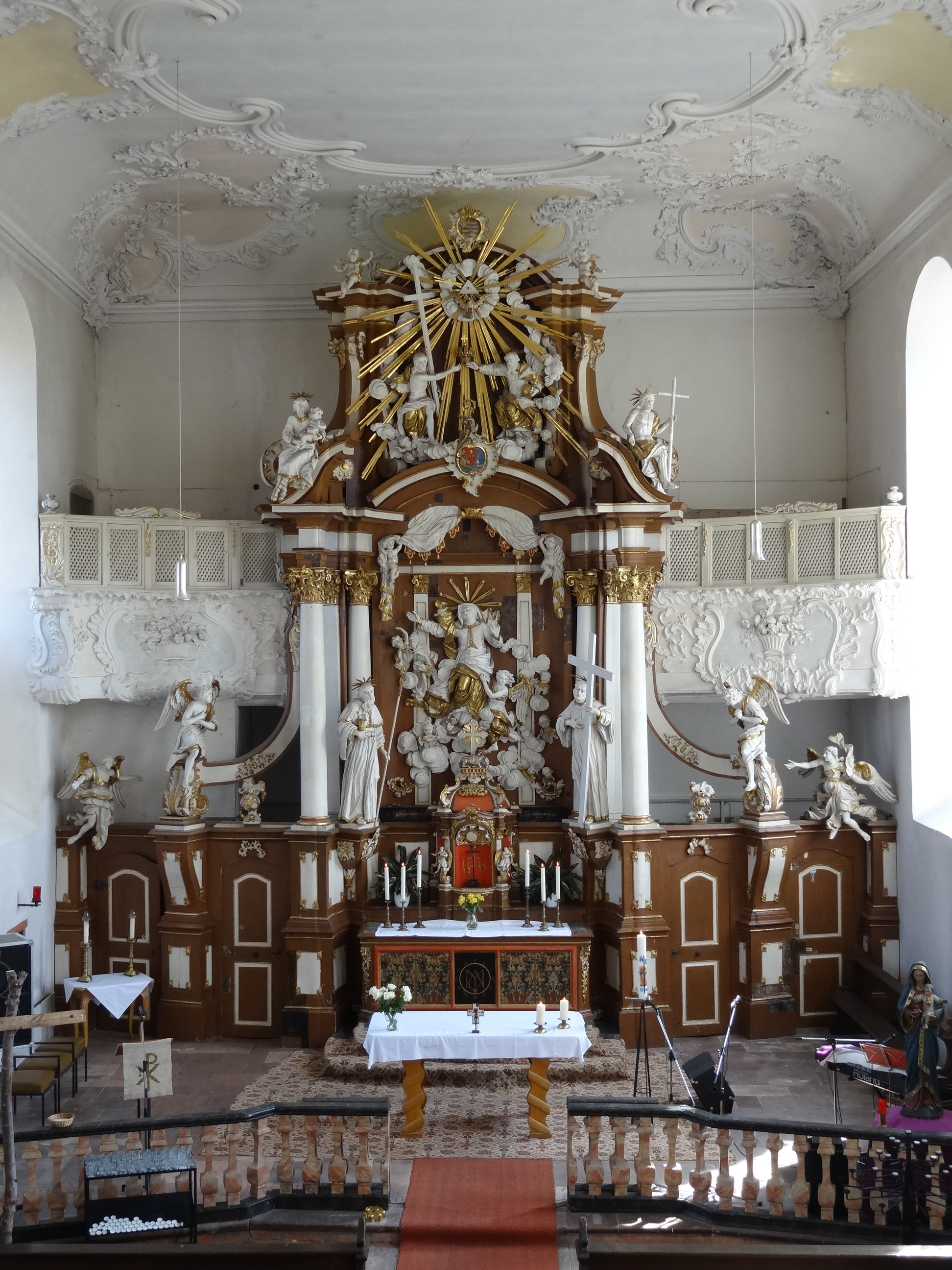 Klosterkirche (JVA Rockenberg)